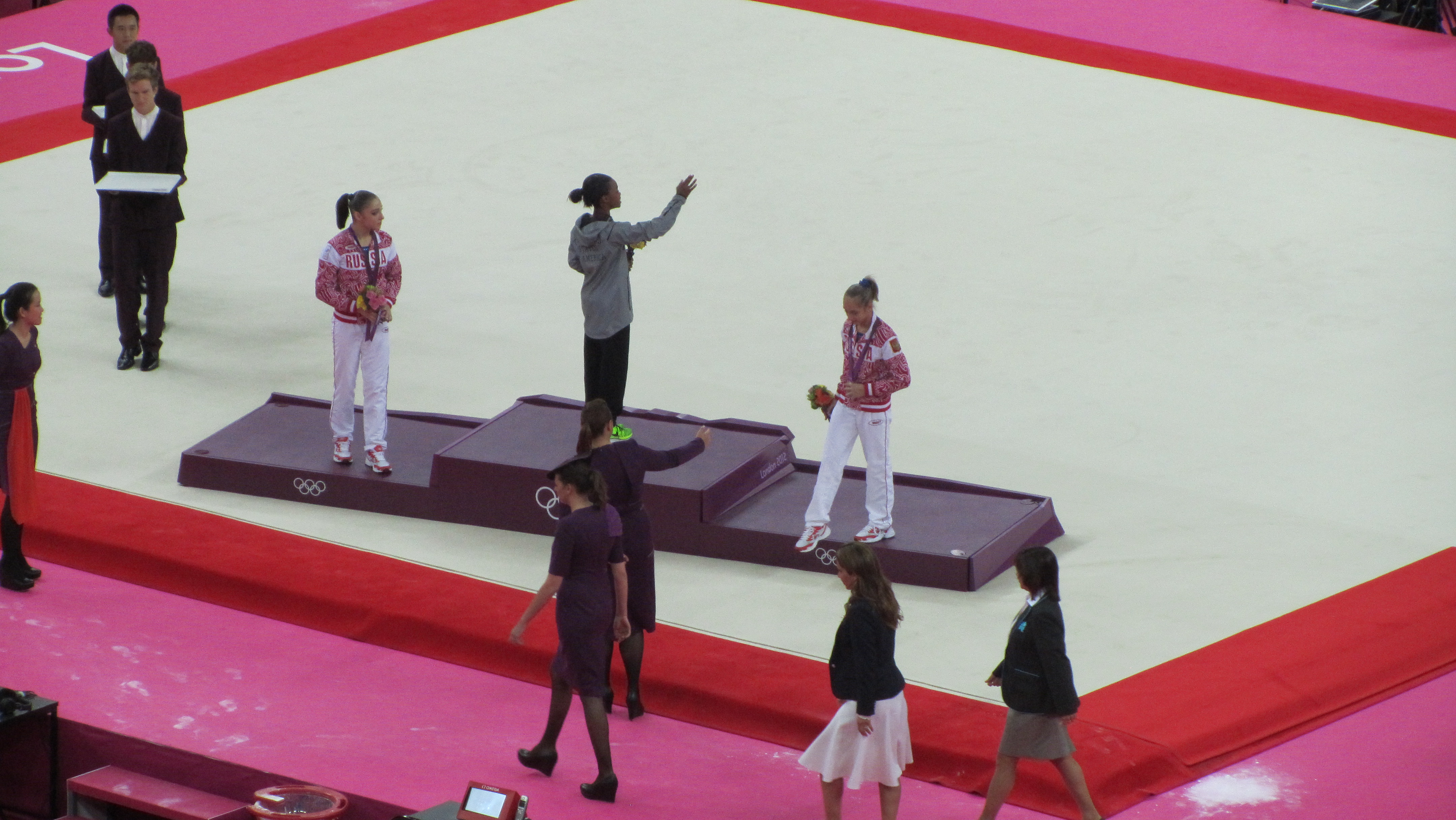 Gold: Gabrielle Douglas (USA); Silver: Viktoria Komova (Russia); Bronze: Aliya Mustafina (Russia)